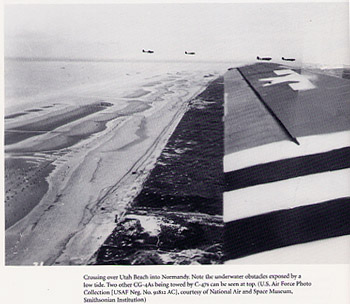 Crossing Utah Beach (From The Glidermen of Neptune page 36 - U.S. Air Force Photo Collection - USAF Neg. No. 91812 AC)